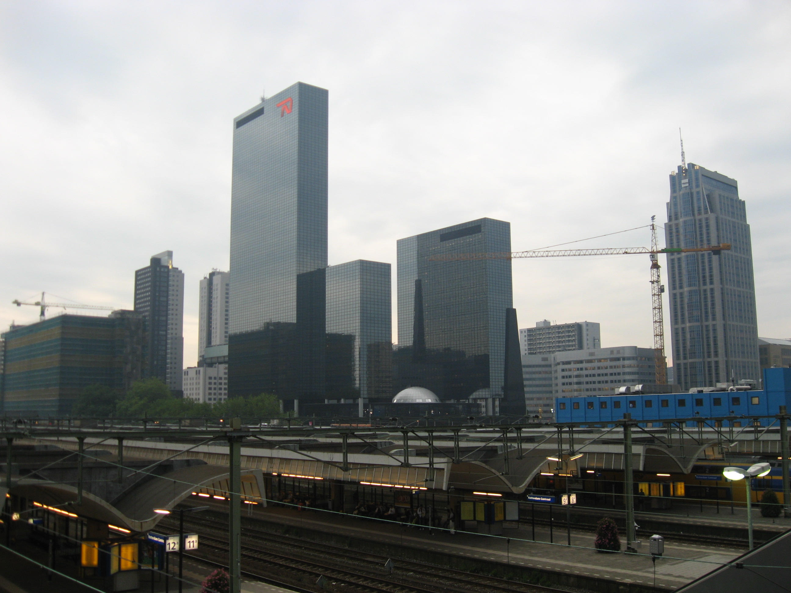 Rotterdam CS met nog de oude perronoverkappingen